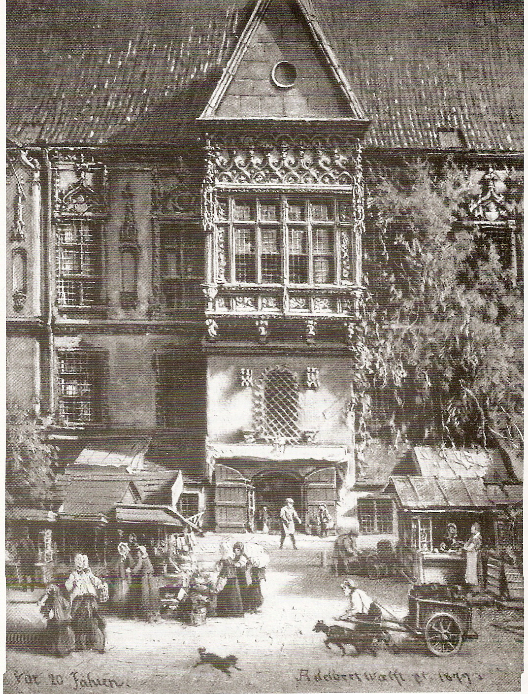 Wejscie do piwnicy Świdnickiej